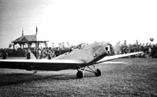 Robert Kronfeld Klemm Kl 25 repülőgépe a gödöllői cserkész világtalálkozón